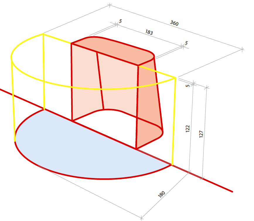 Hokejova branka